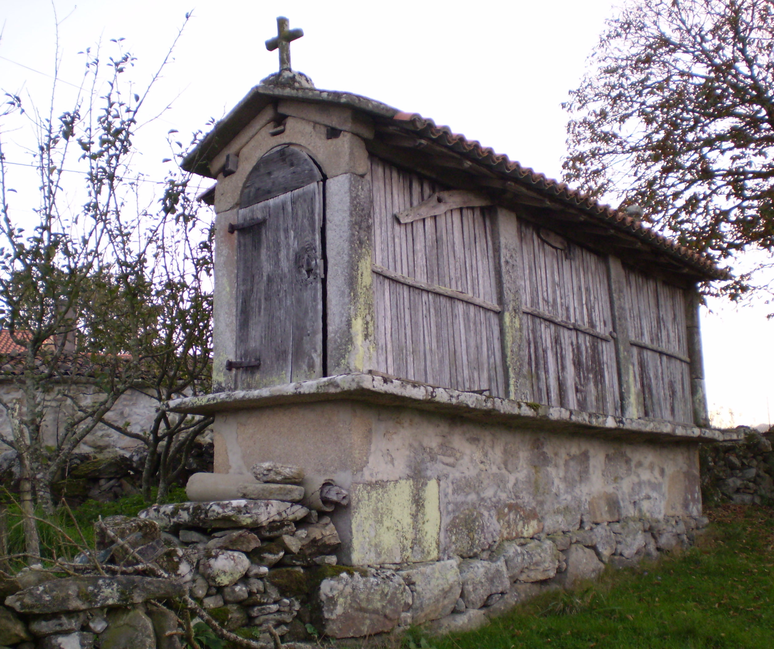 Hórreo tipo mahía, de tres claros, sobre soleira de mampostería. Elaborada porta penal. Coroado con cruz latina e lampión. Ubicado no lugar de San Fiz de Amarante (Antas de Ulla. Un dos hórreos máis antigos do Concello de Antas de ulla e da propia Comarca da Ulloa)